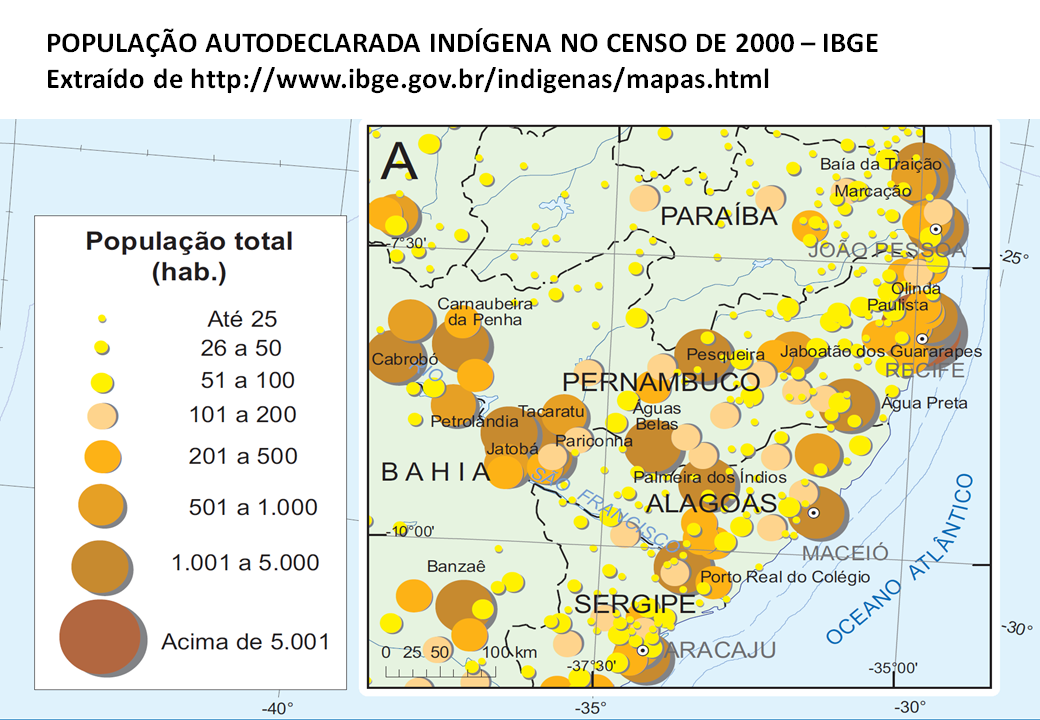 População Autodeclarada Indígena em 1991